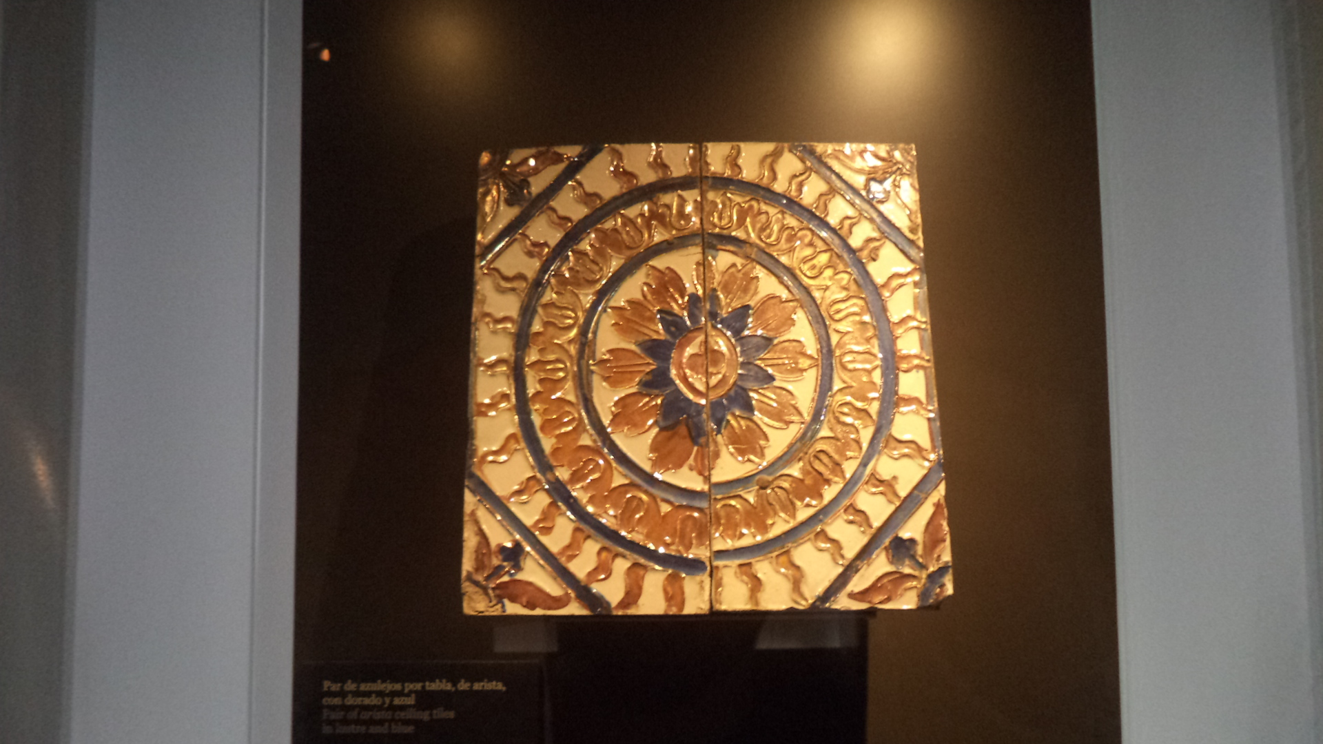 Colección Carranza del Alcázar de Sevilla. Par de azulejos por tabla, de arista, en dorado y azul. Siglo XVI